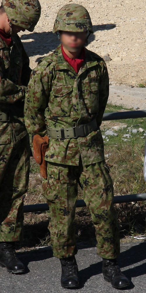 第10師団創立記念行事にて